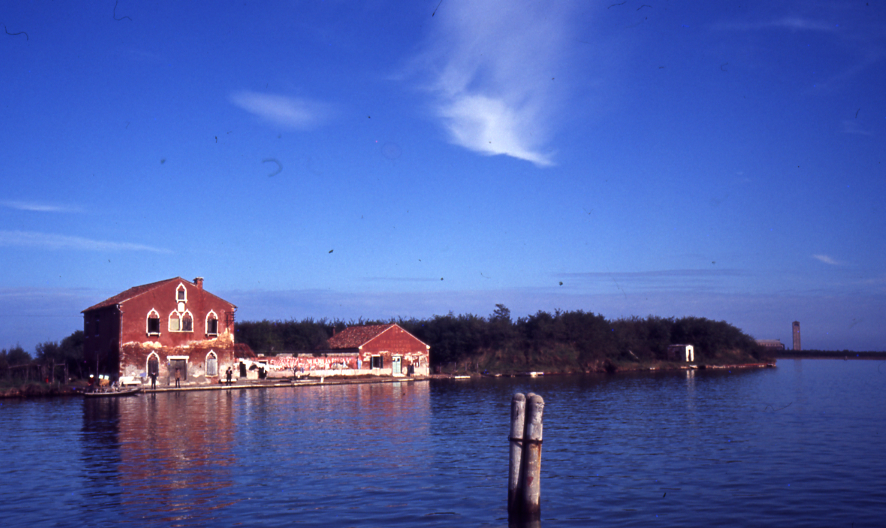 Servizio fotografico : Venezia, 1977 / Paolo Monti. - Foglio: 1, Fotogrammi complessivi: 6/20 : Diapositiva, sviluppo cromogeno/ pellicola ; 35 mm. - ((. - Le diapositive nn. 05-07; 10-20 costituiscono altre serie. - Alcuni chassis riportano iscrizioni inventariali? manoscritte su striscia adesiva in carta bianca (es. MO 271). - Fonte: Agenda di Paolo Monti: Leica 1501-3000 Controllo numerazione (1950-1978), presso Archivio Paolo Monti. - Fonte: Rubrica di Paolo Monti: Diapositive 24x36mm (1948-1982), presso Archivio Paolo Monti. Rubrica con elenco soggetti e numeri di inventario (da 1 a 1000) corrispondenti ai fogli a tasche in pvc in cui sono contenute le diapositive.